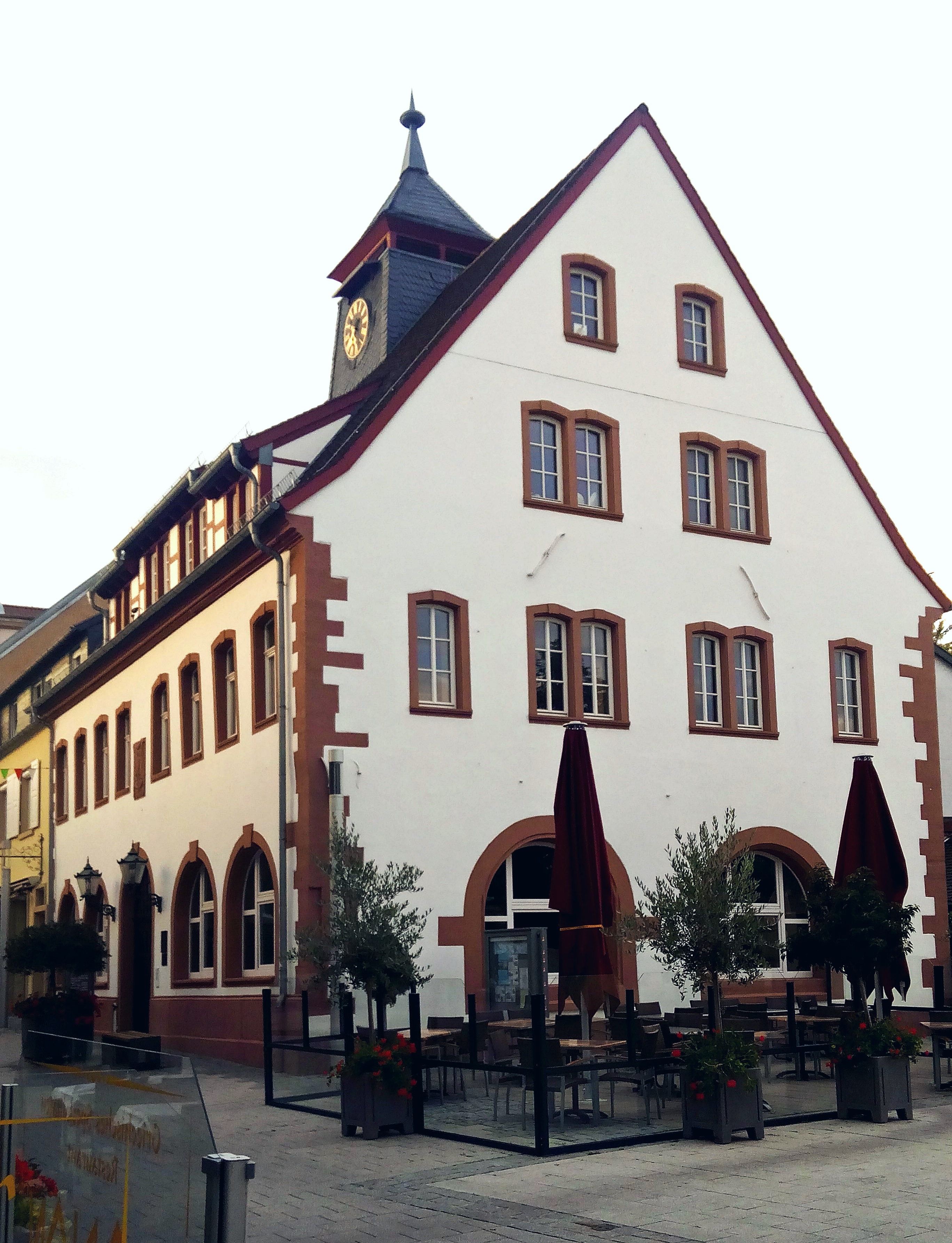 Altes Rathaus in Grünstadt, Hauptstr. 84